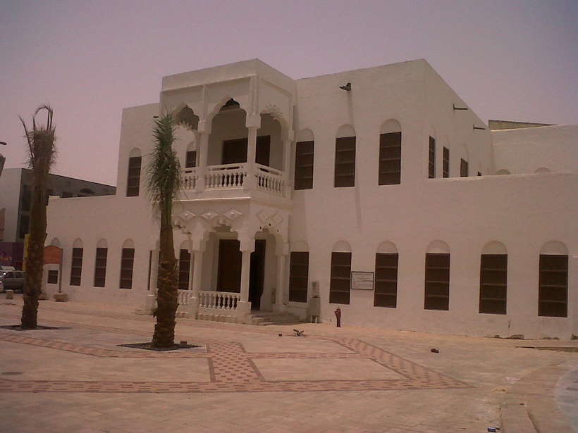 واجهة مدرسة الهفوف الأولى